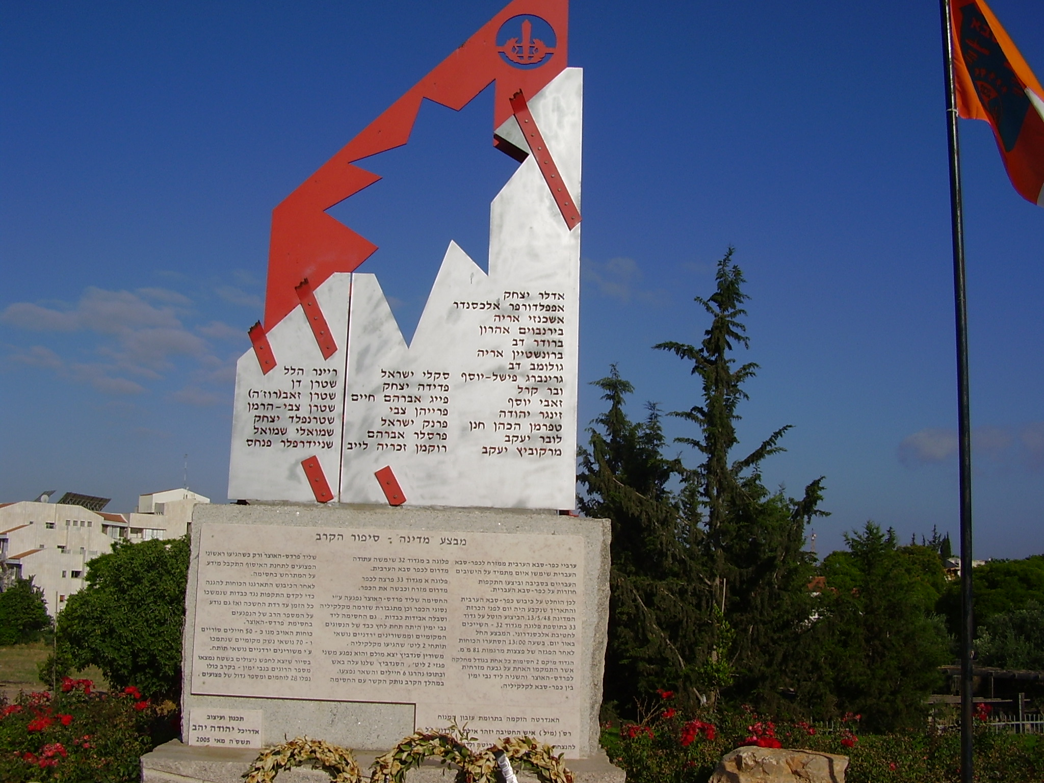 אנדרטה בכפר סבא לנופלים במבצע "מדינה" תכנון וביצוע-אדריכל יהודה יהב